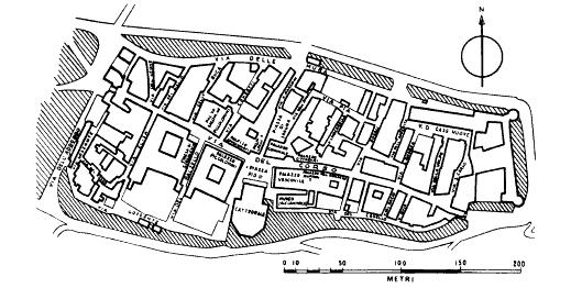 grondplan van de stad Pienza